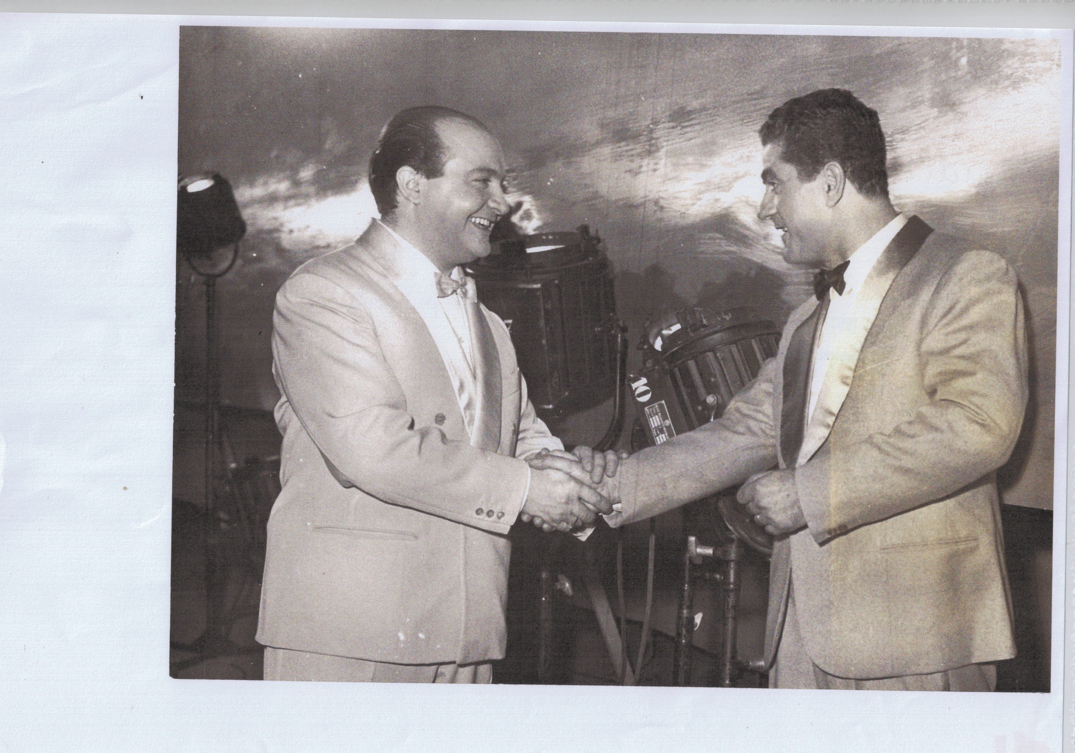 Foto storica dell'Archivio fotografico "Aldo Palazzi"maggio 1957, successivamente Fotoagenzia Ruggieri in Galleria Umberto I di Napoli ed acquistata da Rosario De Falco dall'archivio fotografico francese Marie Claire n. 05 del 1° febbraio 1958 nel 2016. Proprietà privata se ne autorizza la pubblicazione citando la fonte.